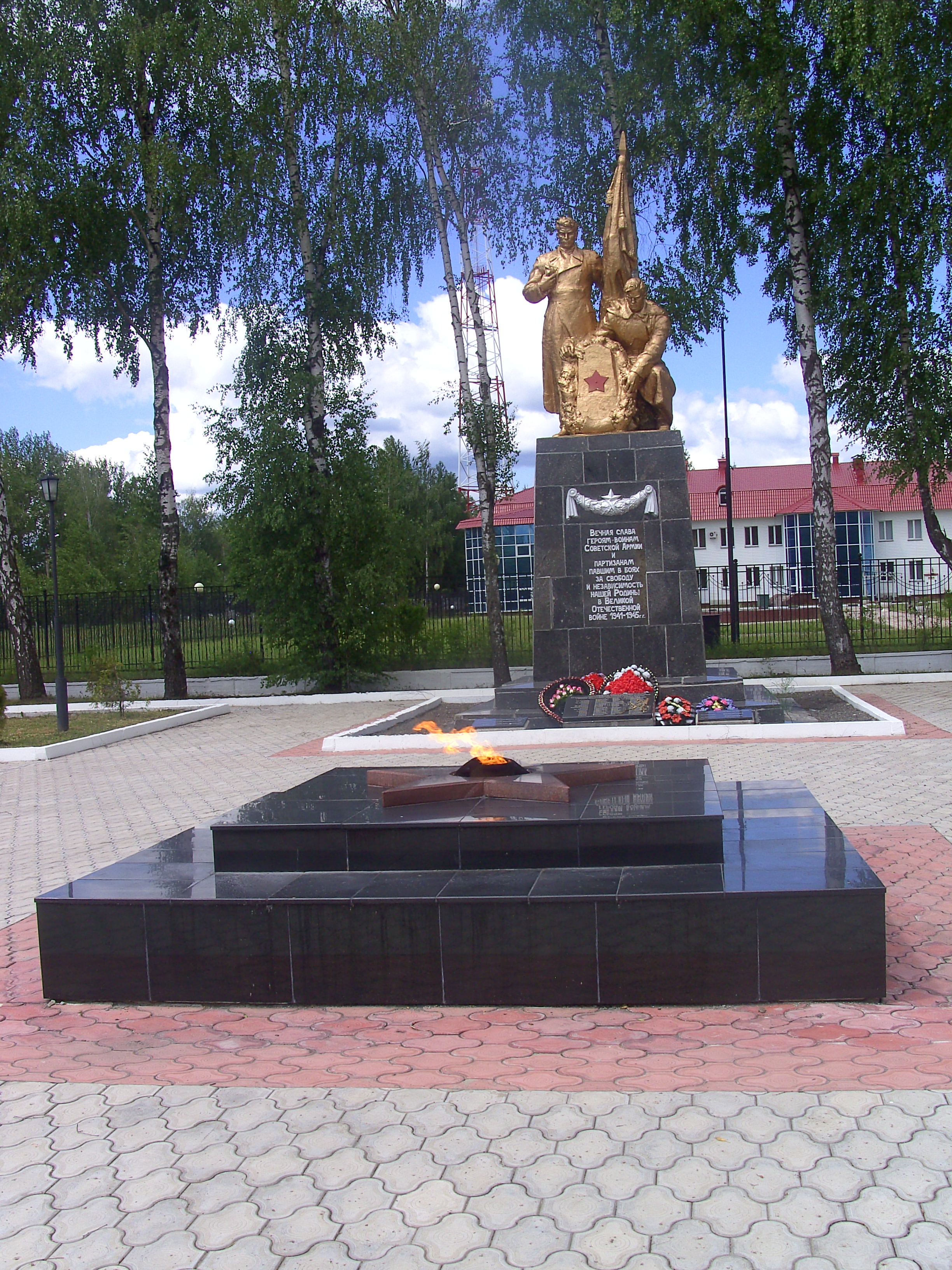 Памятник в Первомайском